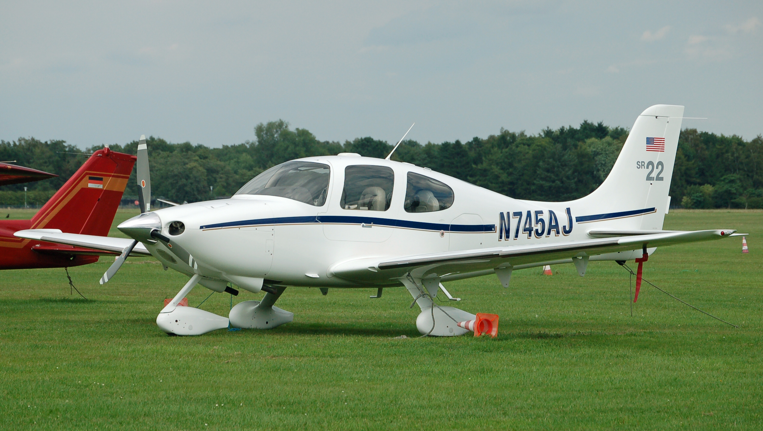 Cirrus SR22 (N745AJ) auf dem Flugplatz Uetersen